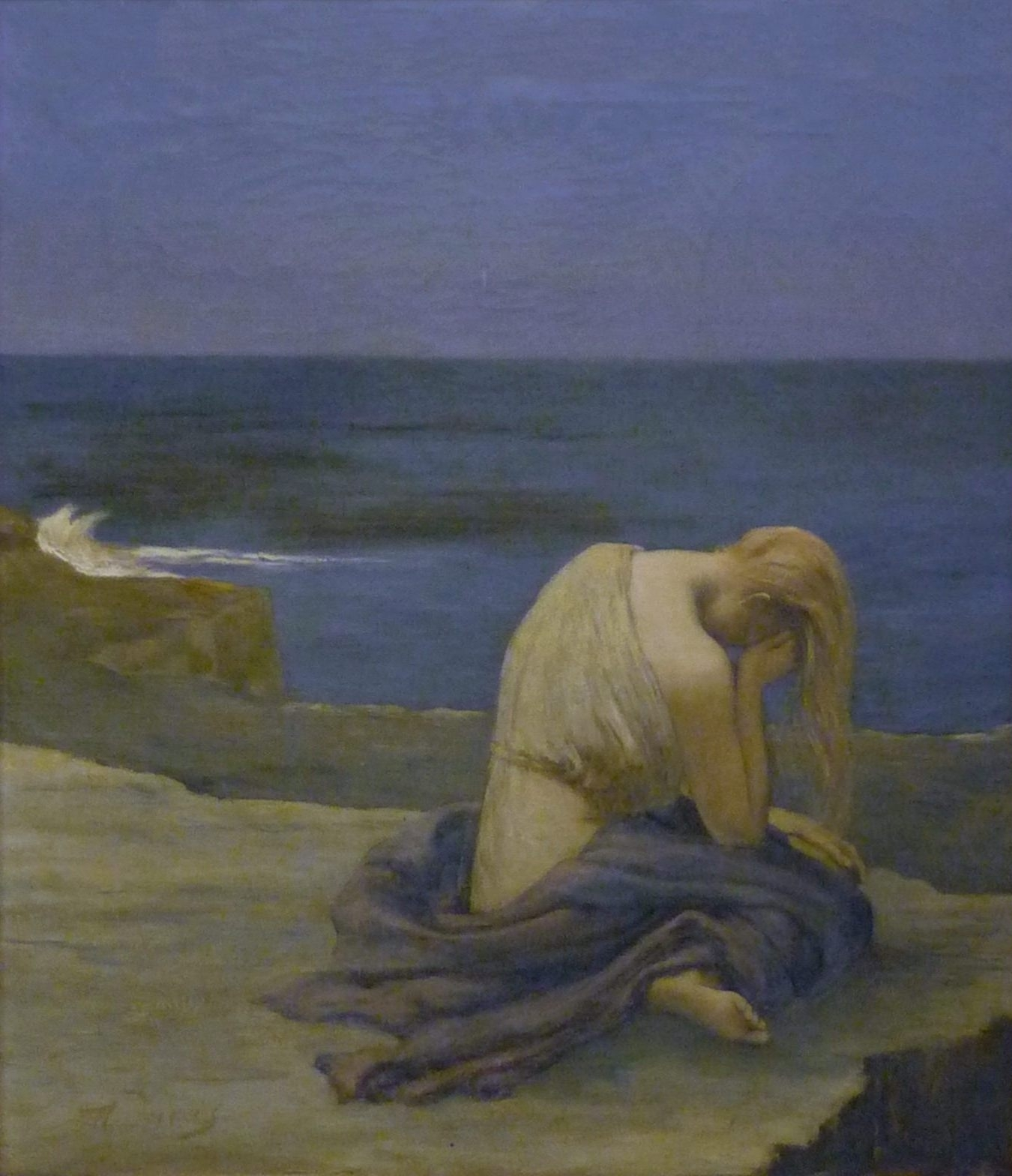 Henry Daras : Femme pleurant à la fin du jour, vers 1918. Musée des Beaux Arts d'Angoulême, Charente (France).